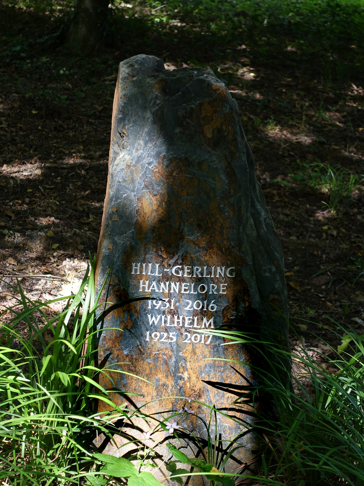 Friedrich Hill-Gerling (1925–2017), Betriebswirt, Dr. rer. pol. h. c. Universität Freiburg, Friedhof Oberwil, Basel-Land, Schweiz